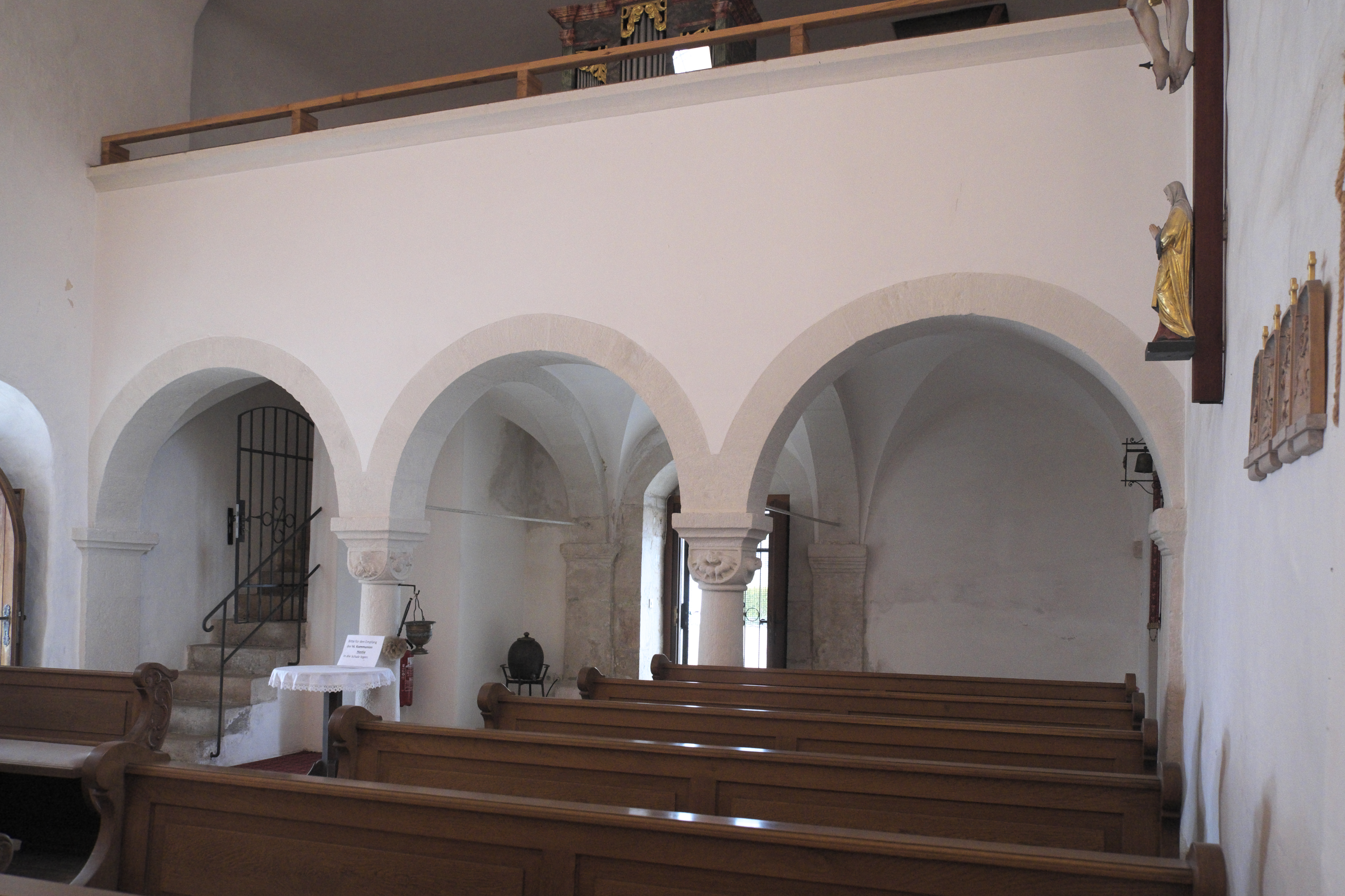 Katholische Filialkirche St. Margareta in Weißendorf (Oberdolling) im oberbayerischen Landkreis Eichstätt (Bayern/Deutschland), Empore auf Säulen mit Würfelkapitellen